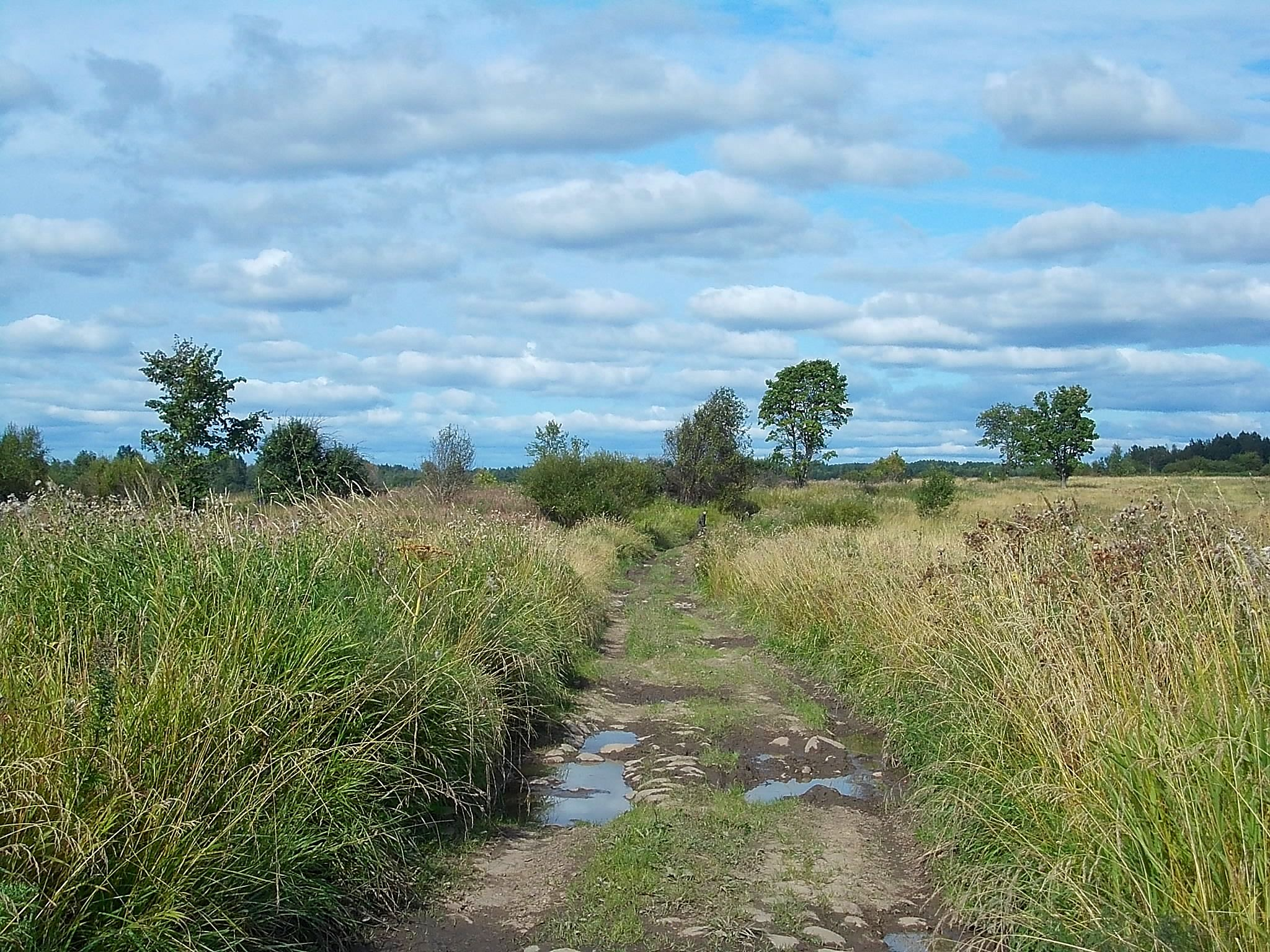 Дорога в бывшей деревне